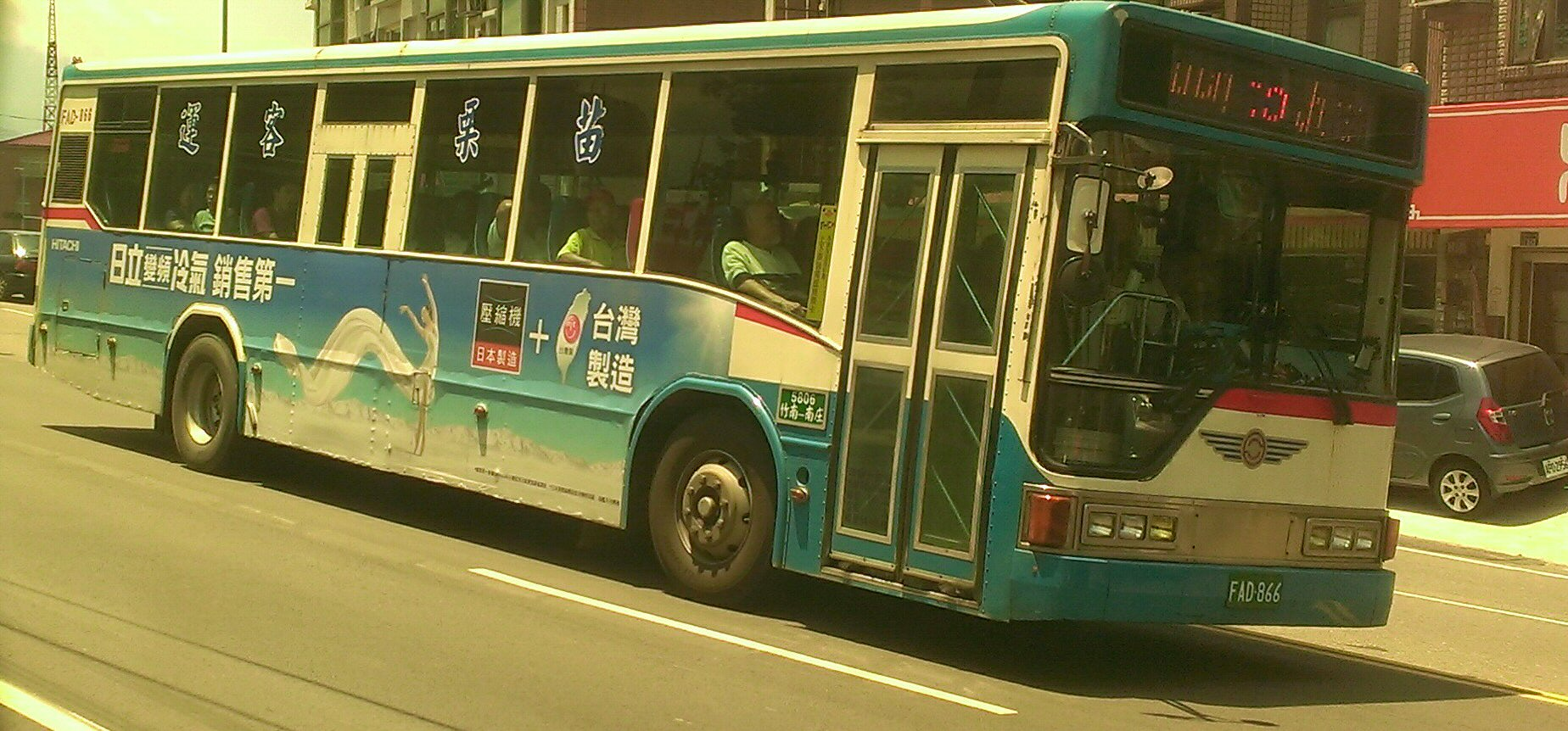 苗栗客運日野ERK2JRL大客車FAD-866，行駛於苗栗縣頭份市中正一路。